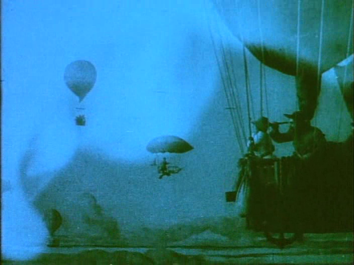 Description